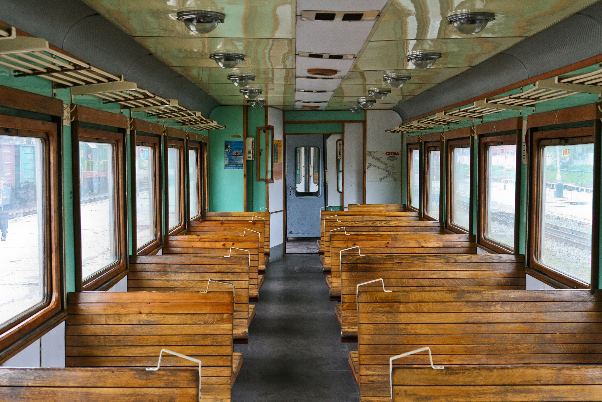 Салон головного вагона дизель-поезда Д1-569